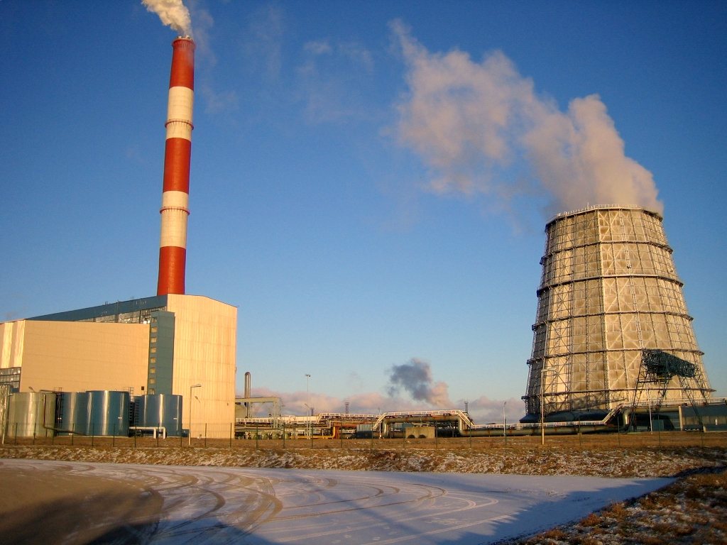 Iru elektrijaam. Jaanuar 2006